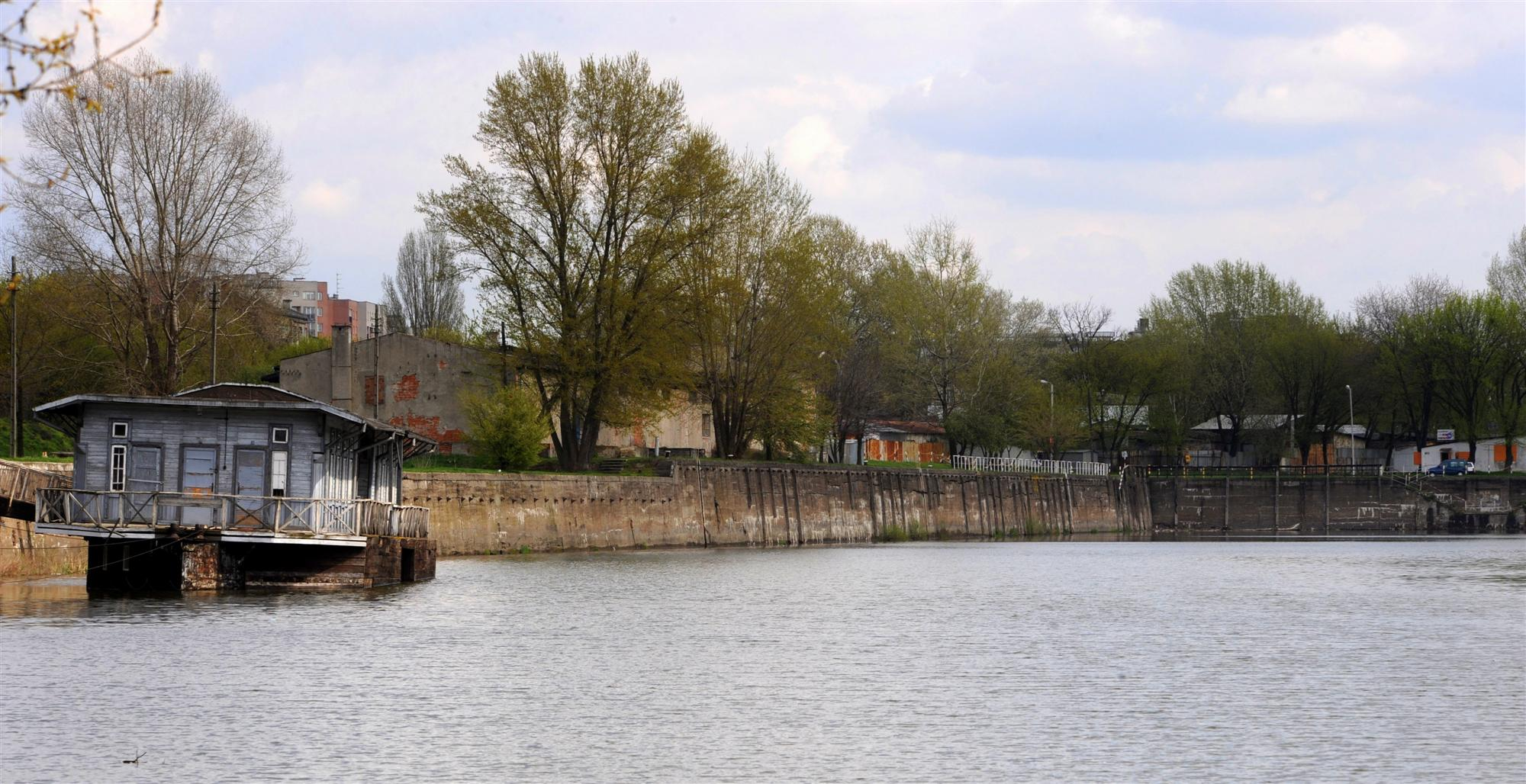 Port Praski w Warszawie